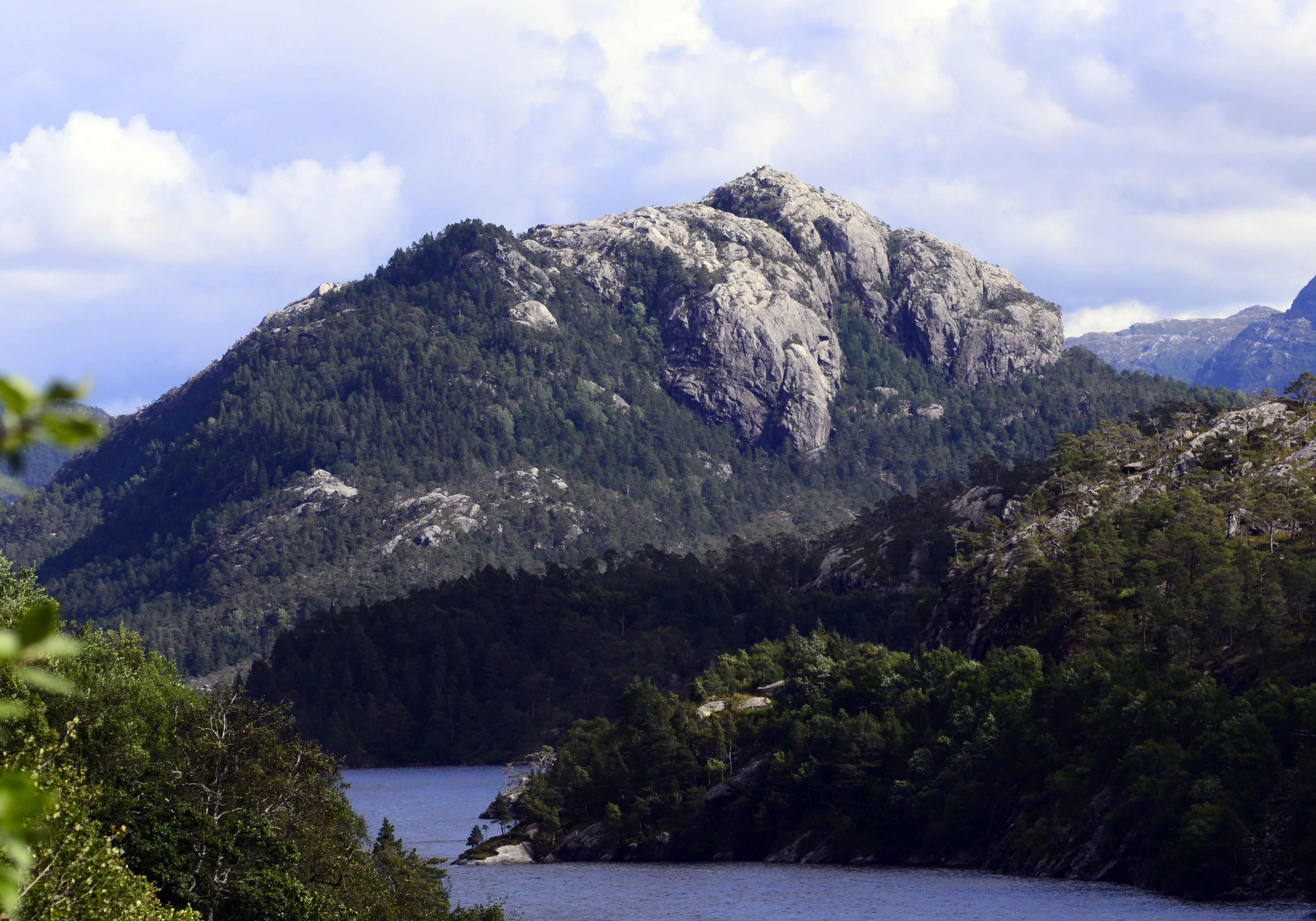 Tjofjellet sett fråvest. Vatnet i forgrunnen er Haukåvatnet.